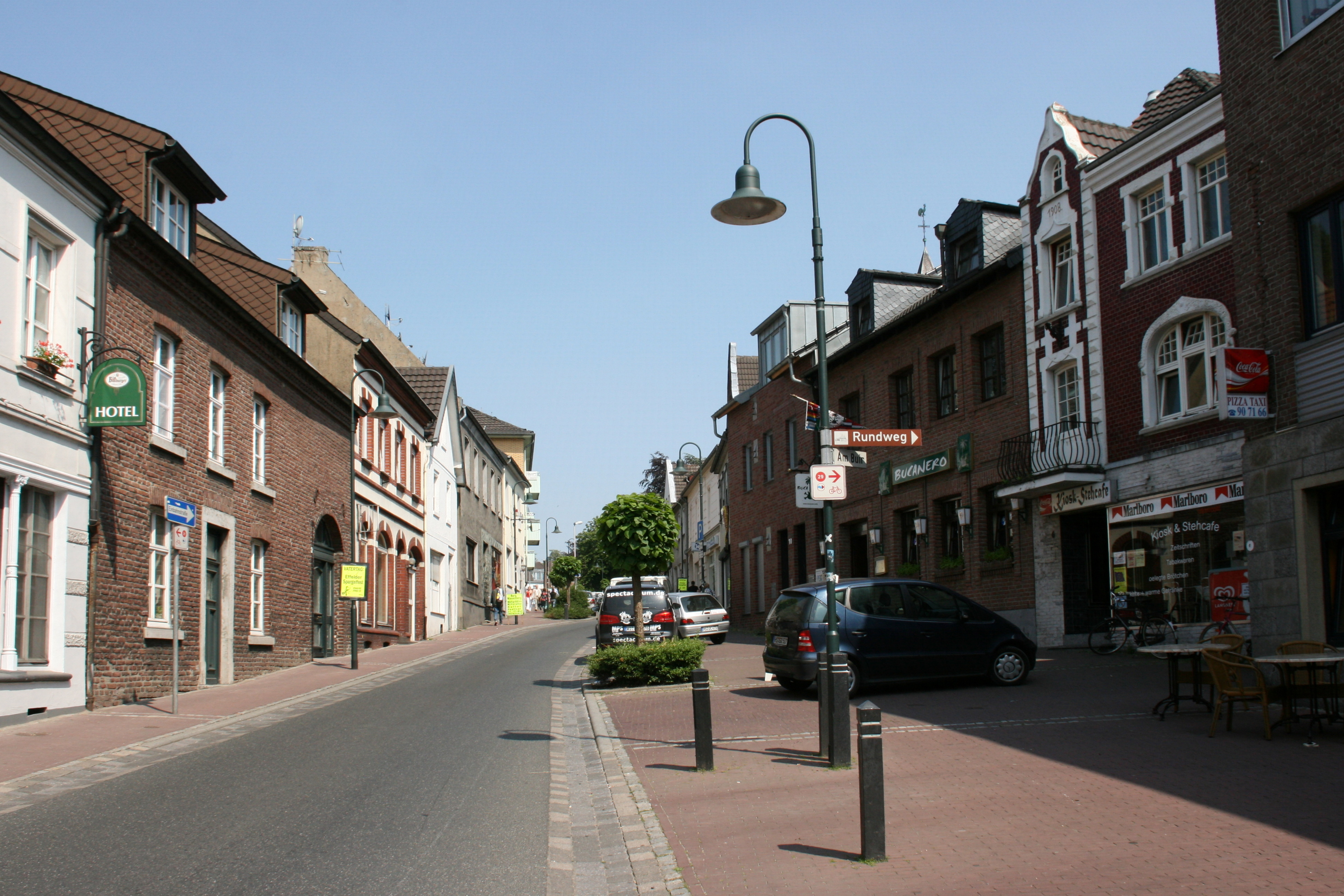 Kirchstraße in Wassenberg